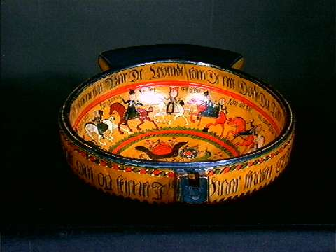 Trøys malt av Guttorm Person Eftestøl i 1832. Fra Hægebostad, Eiken i Vest-Agder. Nå på Norsk Folkemuseum, NF.1898-0617.